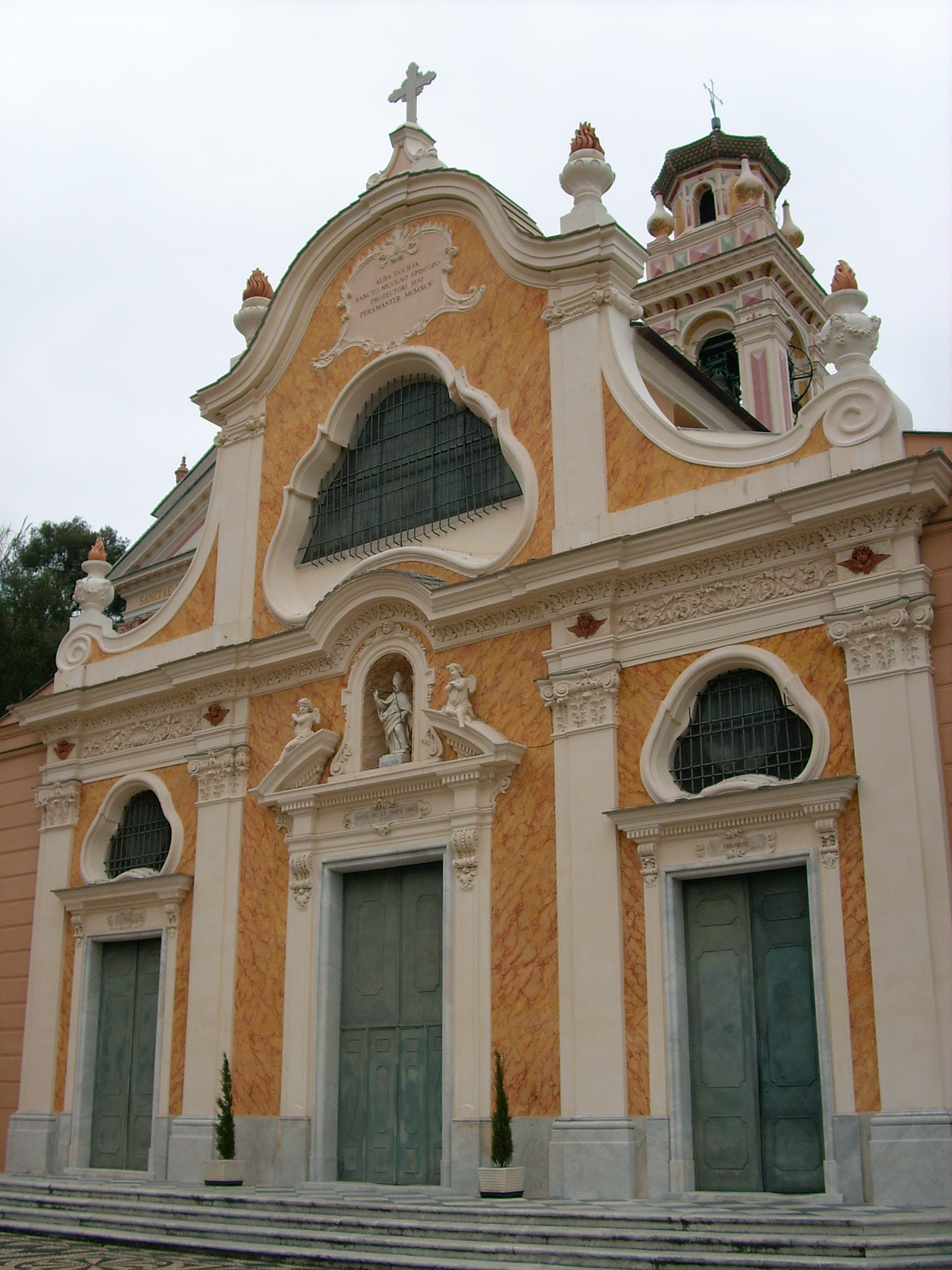 Chiesa di San Nicolò di Albisola Superiore, Liguria, Italy